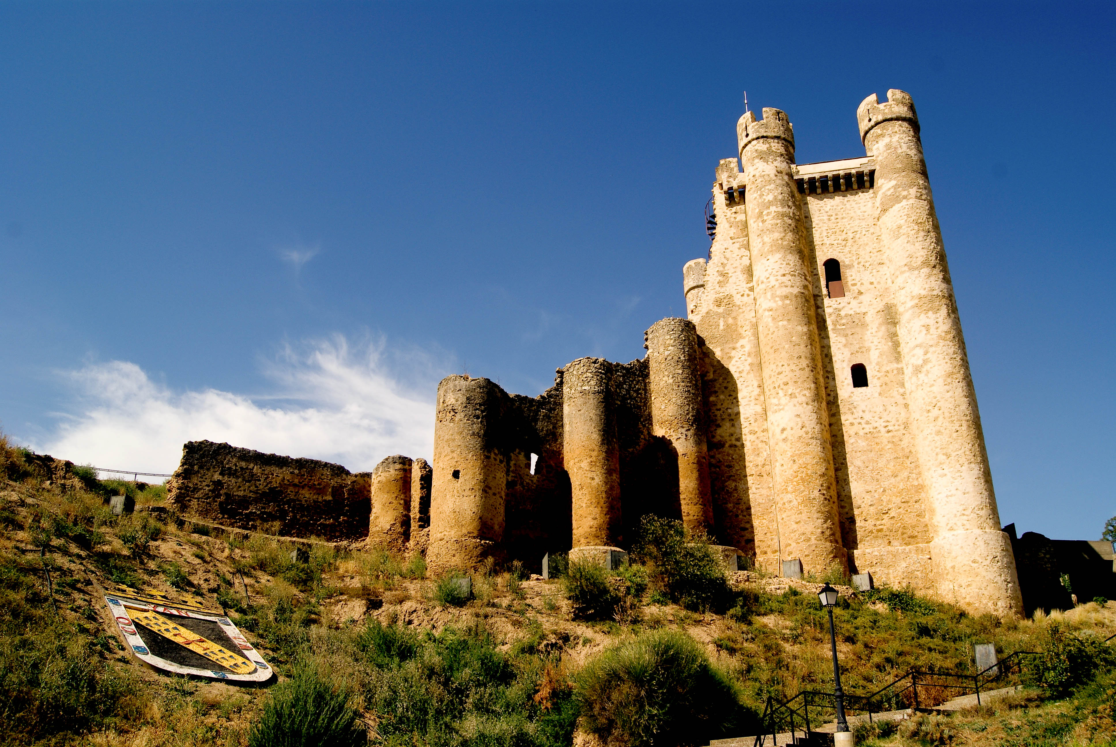 El Castillo de Valencia de Don Juan (mal llamado Castillo de Coyanza) se encuentra en la localidad leonesa de Valencia de Don Juan, en España, antiguamente llamada Coyanza.